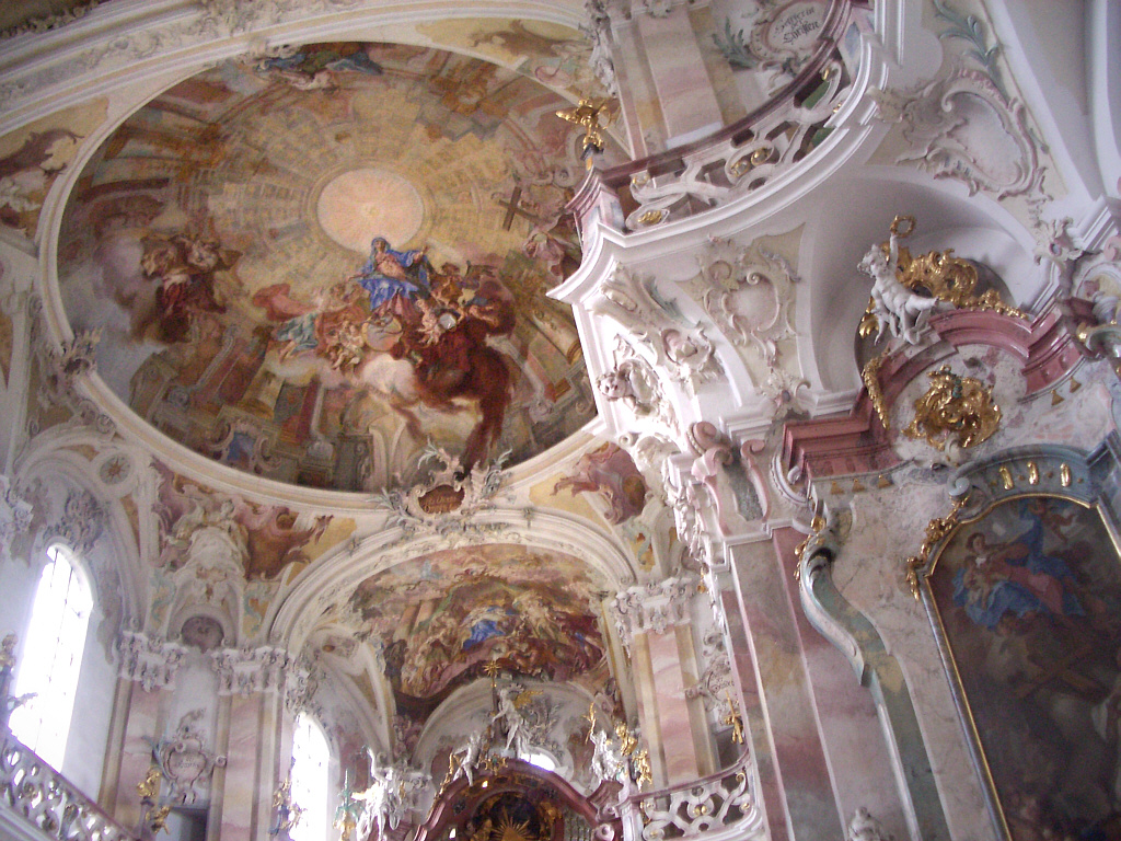 Wallfahrtskirche Birnau, Germany: ceiling